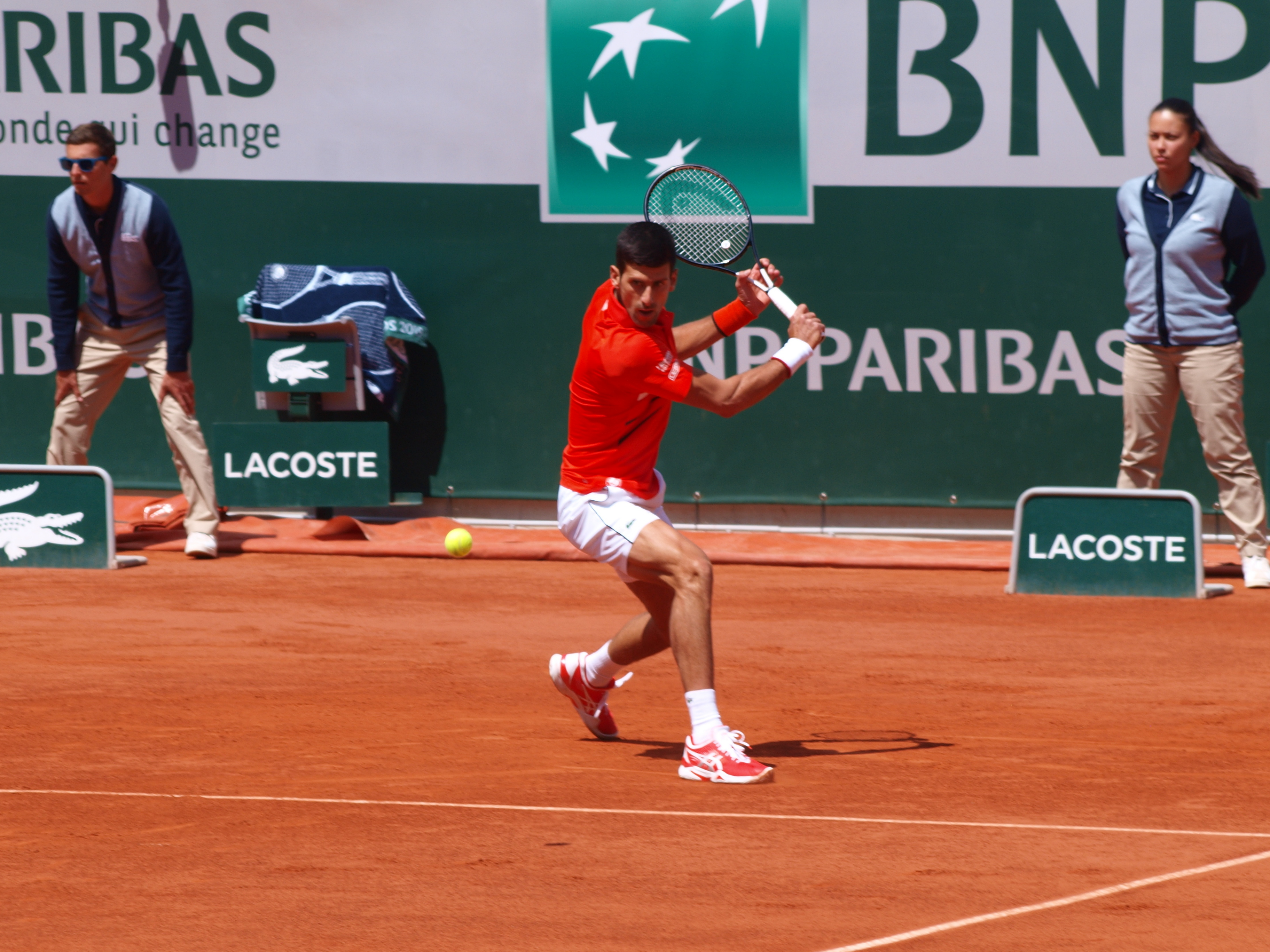 Internationnaux de France de Tennis 2019, au stade Roland Garros de Paris (France), sur le court Philippe-Chatrier rénové; huitième de finale simple-hommes entre N. Djocovic & A. Zverev, le jeudi 6 juin 2019 -- Là, il s'agit du joueur Yougoslave Novak Djokovic (alias Novak Đoković)